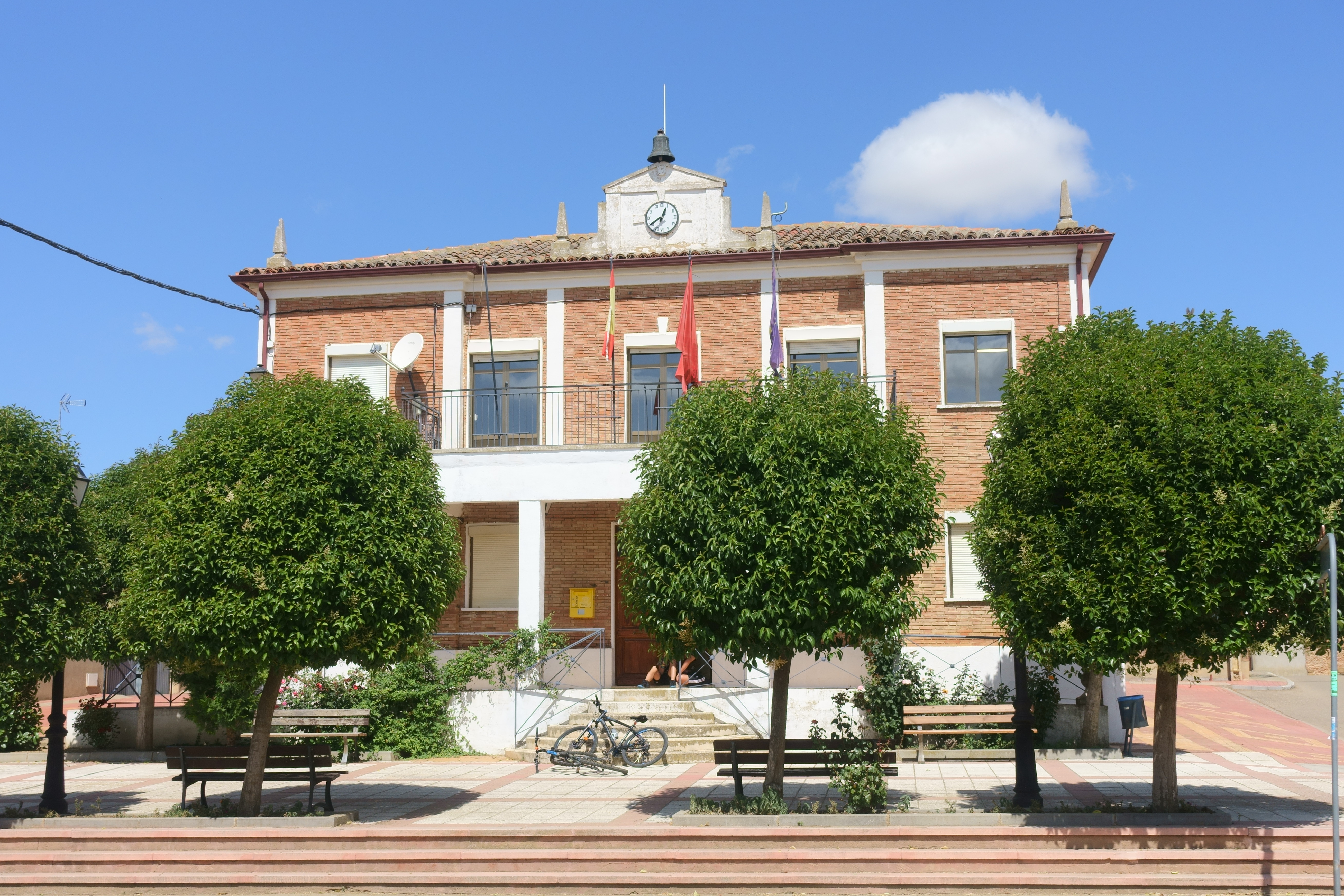 Casa consistorial de Bolaños de Campos (Valladolid, España).